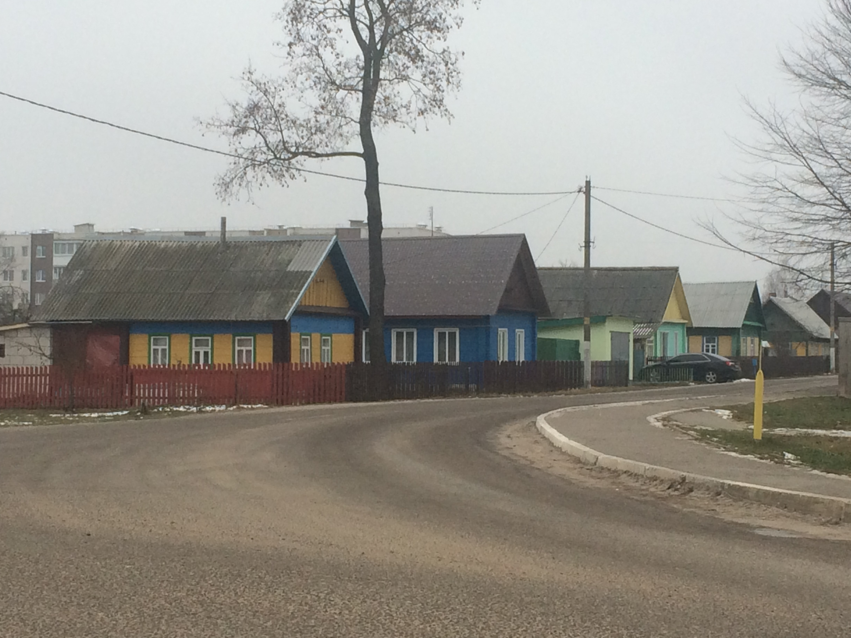 Беларуская (тарашкевіца): Дуброўна (Беларусь) — вуліца Гарулёва.